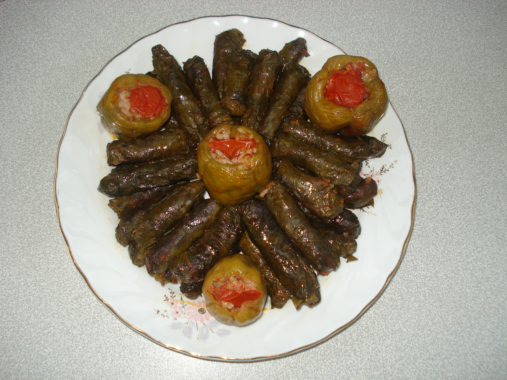 Dosya, yükleyen kullanıcıya aittir. Resimdeki yemek etli biber dolması ile yaprak sarması dır.other version